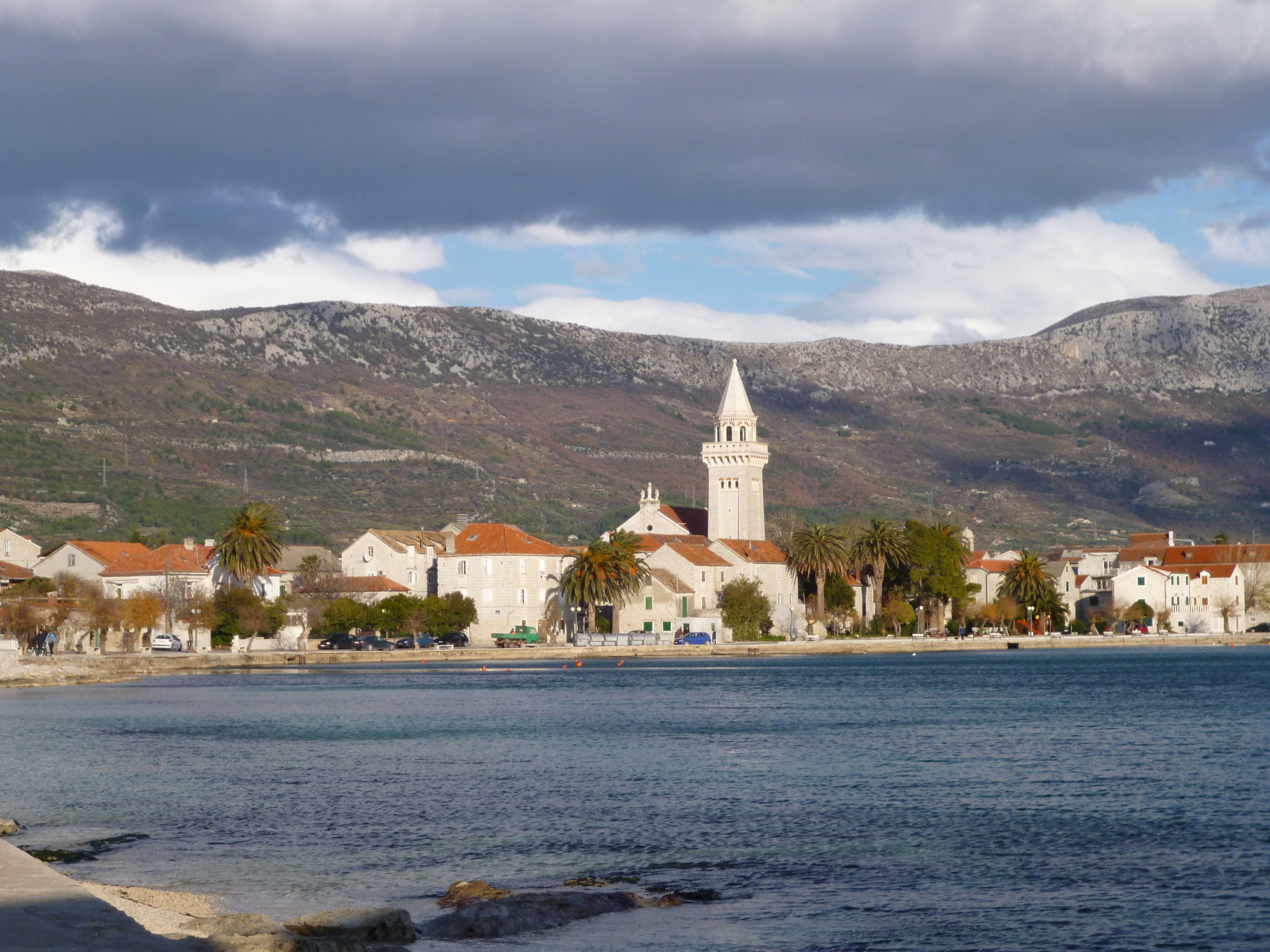 pogled s jugoistoka